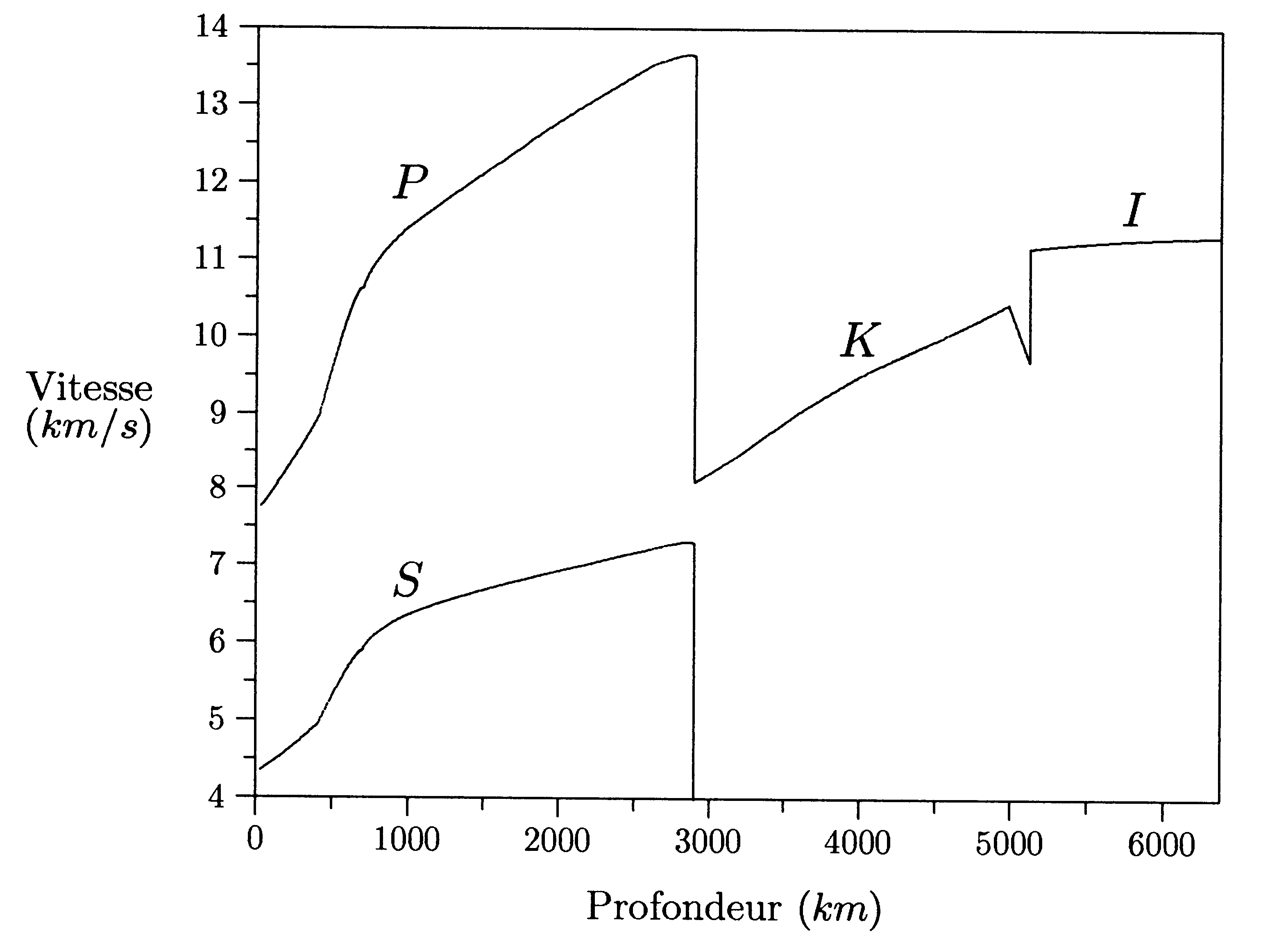 Courbes de vitesse de Jeffreys-Bullen